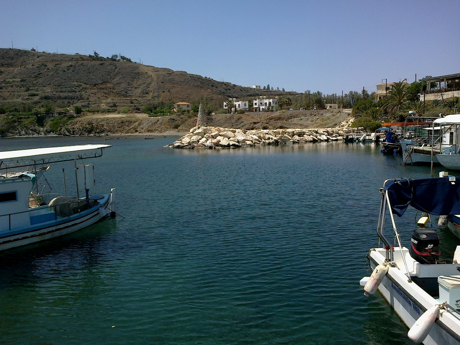 Chypre Pomos Port